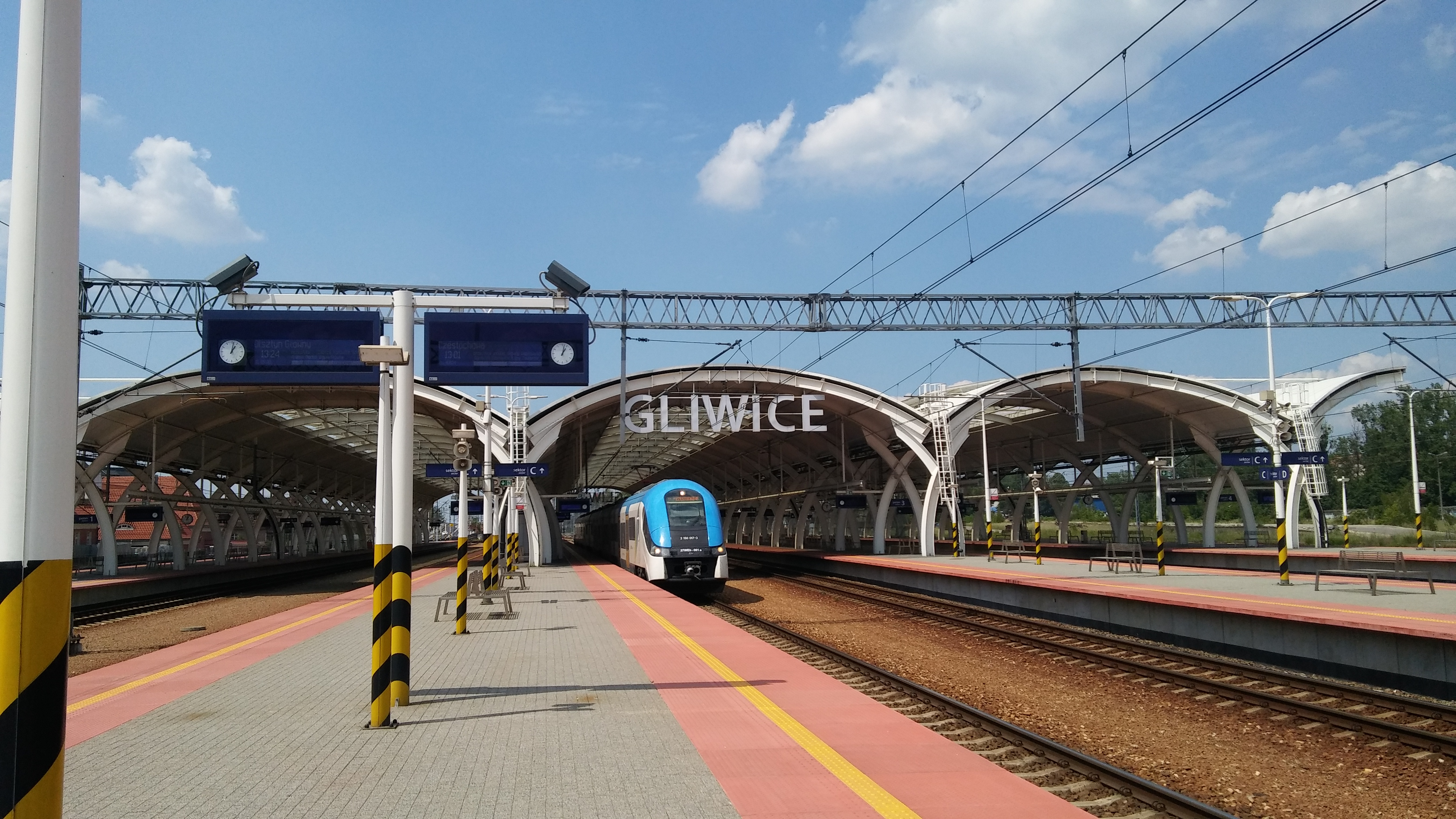 Widok na perony dworca w Gliwicach.